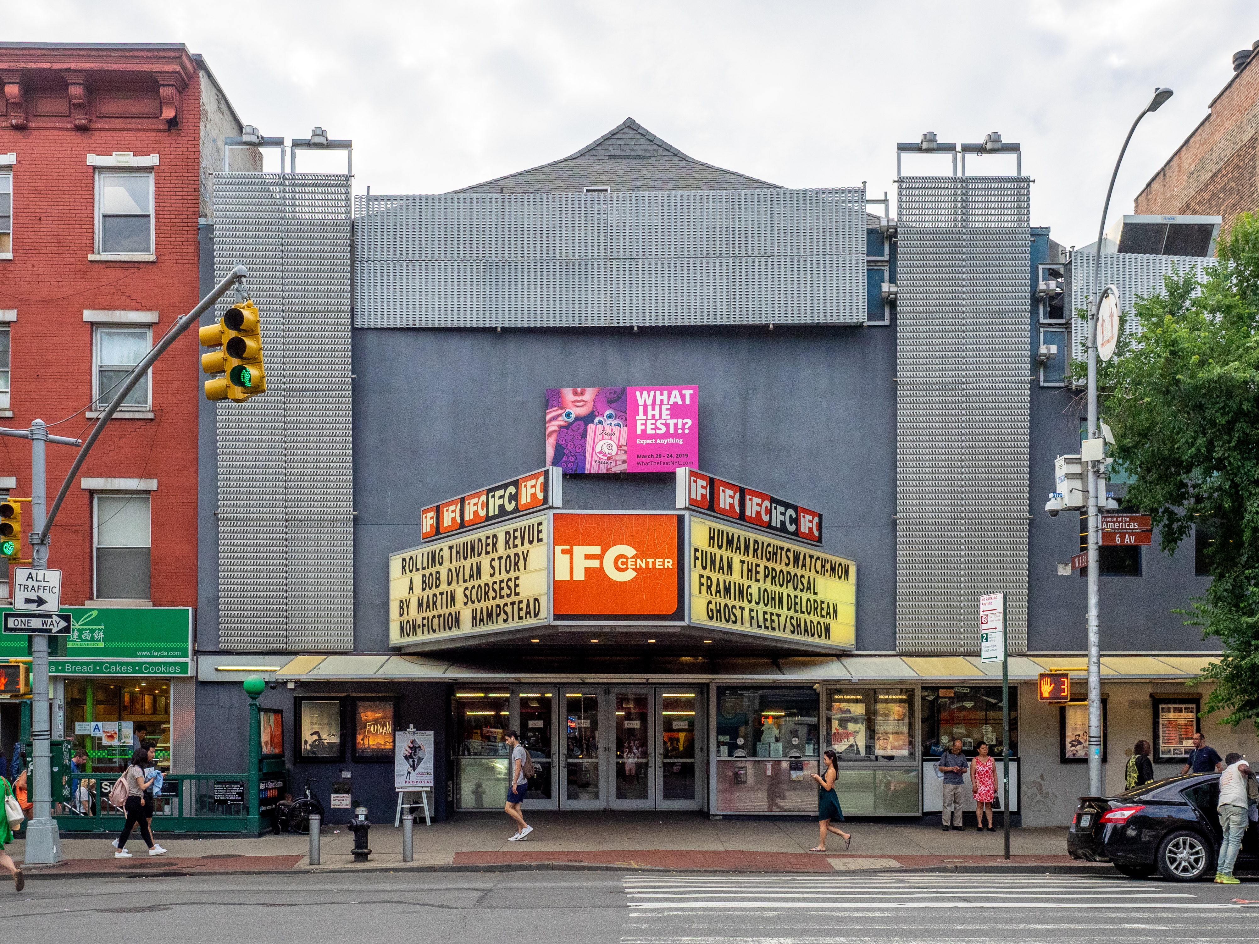 Greenwich Village, NYC